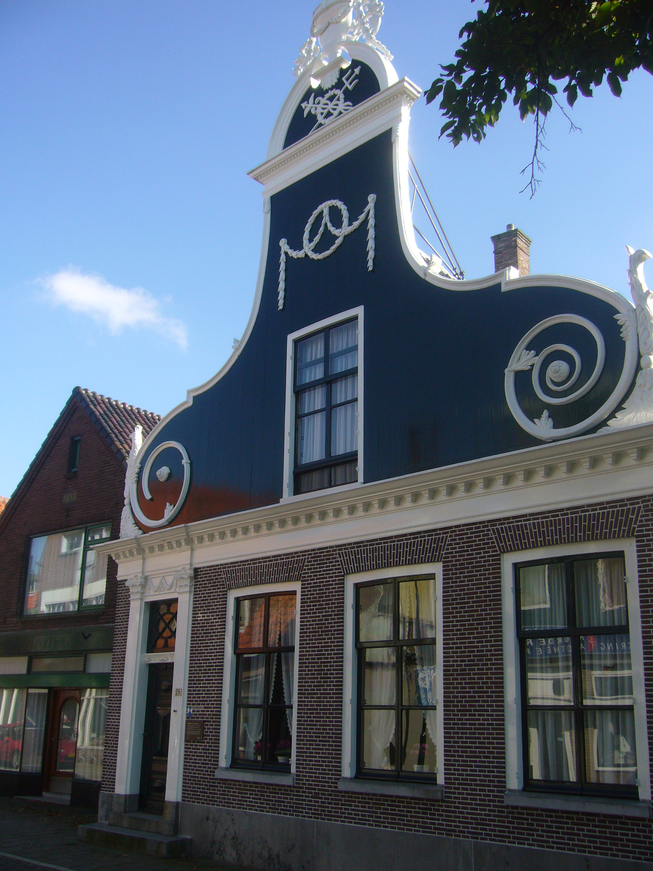 Zaans Woonhuis Noorderhoofdstraat 26 Krommenie